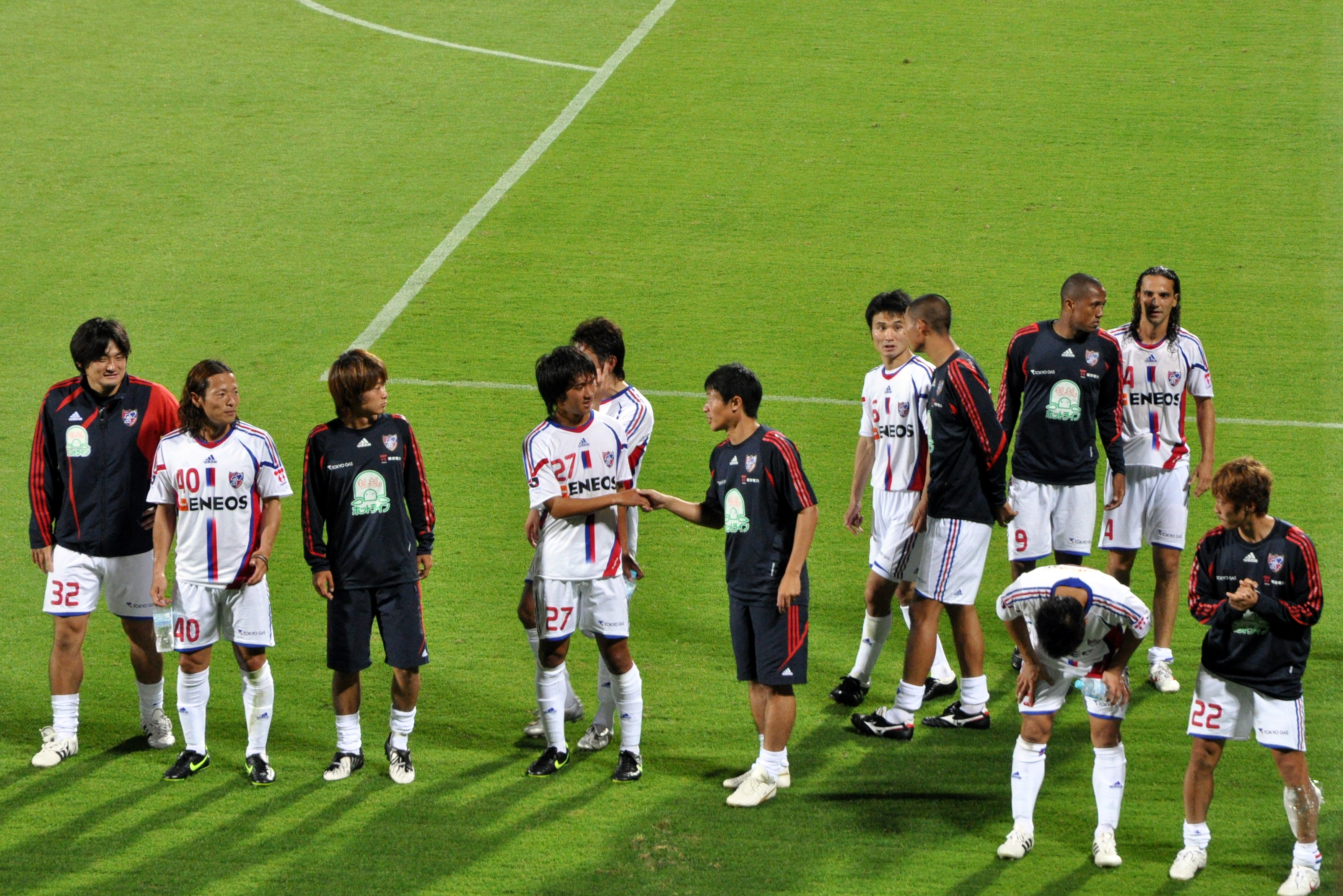 FC Tokyo 2009 team Kashiwa 0 - 3 Tokyo (Goals: Ishikawa, Cabore, Hirayama)